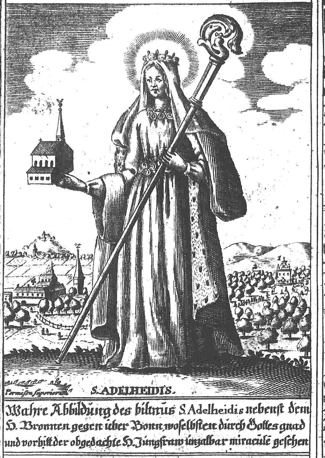 Pilgerblatt (Auszug) mit Adelheid von Vilich vor den Wallfahrtsstätten in Pützchen und Vilich